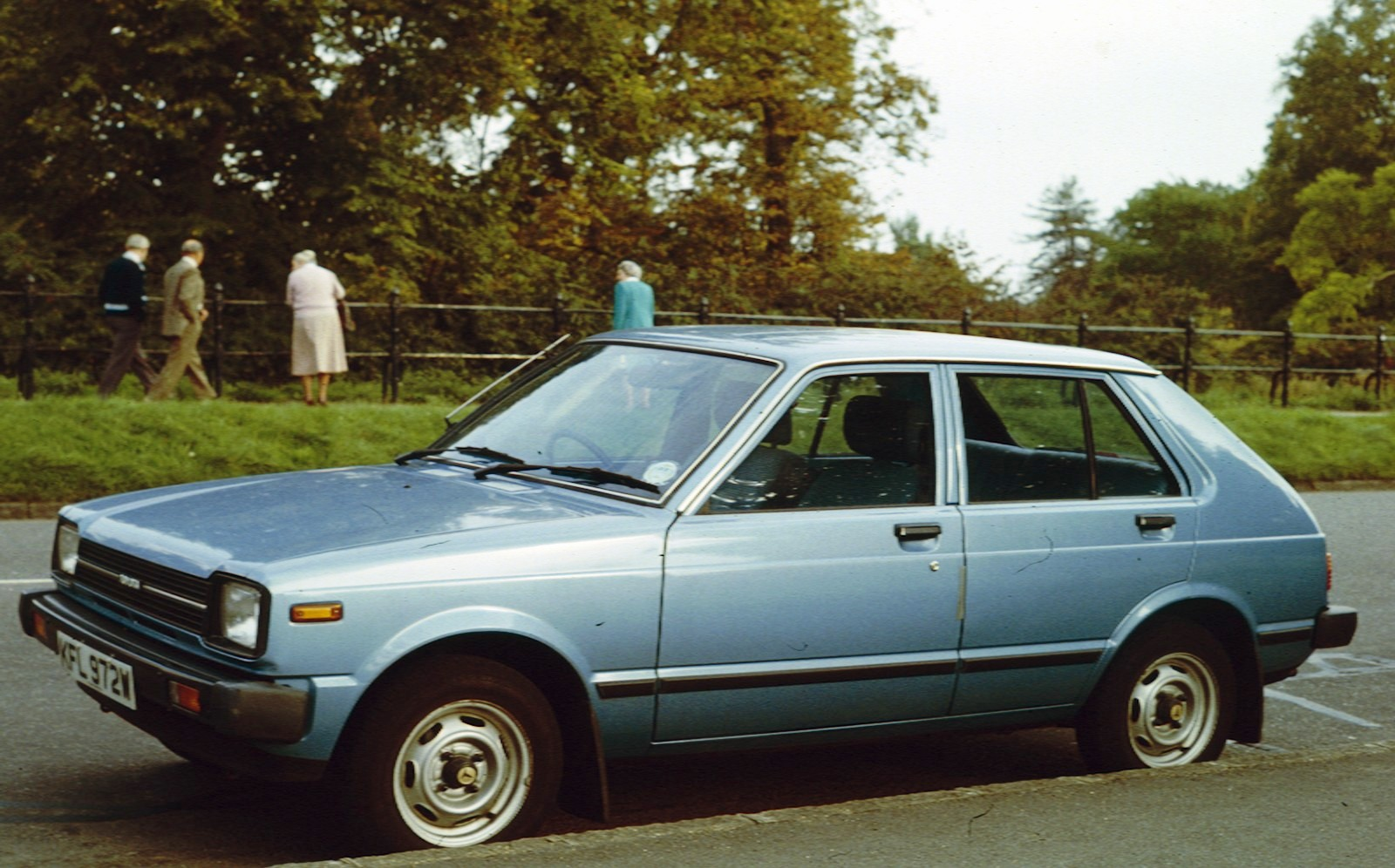 Toyota Starlet 60 5 door 1981